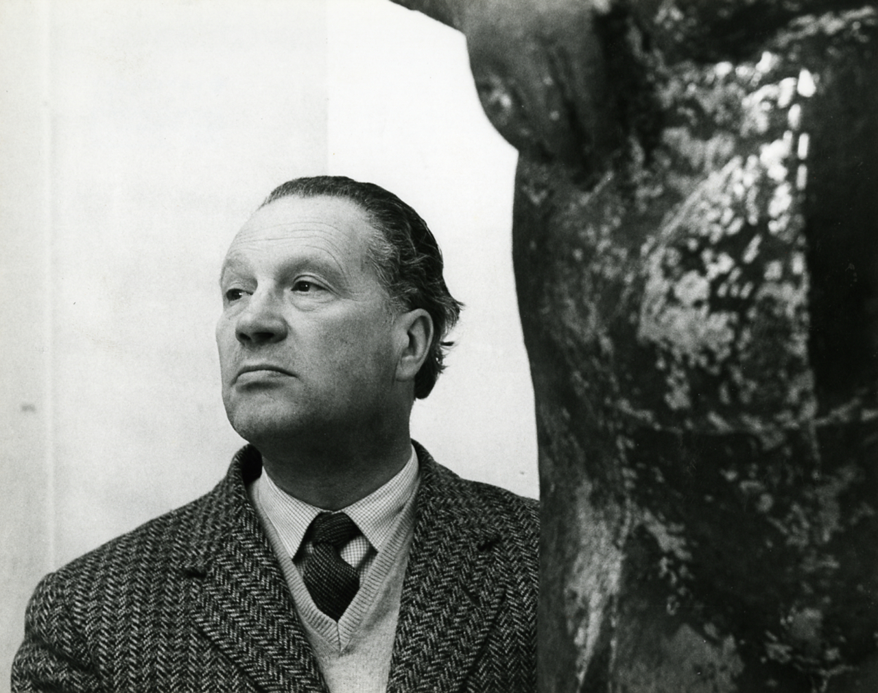 Milano. Studio di Marino Marini. Ritratto dell'artista. Servizio fotografico : Milano, 1958 / Paolo Monti. - Stampe: 5 : Positivo b/n, gelatina bromuro d'argento/ carta, 24x30. - ((Al verso delle stampe manoscritti i numeri secondo numerazione interna alla serie di stampe "Ritratti artisti"?: 19, 20, 20B, 96; timbro a inchiostro con copyright: "© Copyright/ Credit to/ Paolo Monti/ Corso Sempione [...]/ Milano". Al verso della stampa senza numero identificativo ma con iscrizioni di natura diversa manoscritte al verso, iscrizione didascalica con data manoscritta a matita: "Lo scultore Marino/ Marini/ 1958" e timbro a inchiostro con copyright: "Paolo Monti/ Via V. Colonna [...]/ Milano". - Sul coperchio della scatola iscrizione didascalica manoscritta a pennarello nero: "Ritratti/ Ritratti artisti". - Il negativo identificato con il numero 46397 è stato realizzato per Zodiac. - Fonte: Quaderno di Paolo Monti: Per Mostre: Negative scelte/ vari lavori professionali (s.d.), presso Archivio Paolo Monti